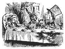 Alice in Wonderland - Mad Tea Party (bekannte, lange schon freie Illustration von Sir John Tenniel aus der Erstausgabe)